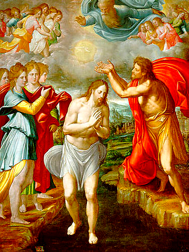 Bautismo de Cristo, Óleo sobre tabla. 48,5 x 37 cm (Museo del Prado, Madrid, España.)